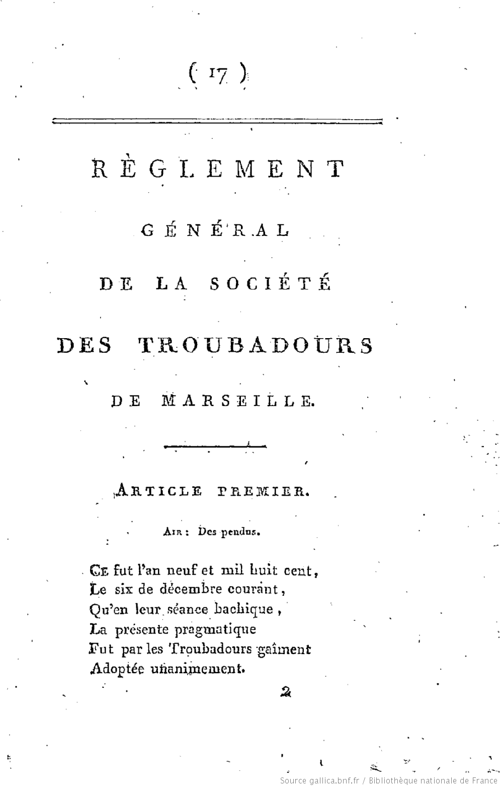 Première page du règlement d'une goguette marseillaise.